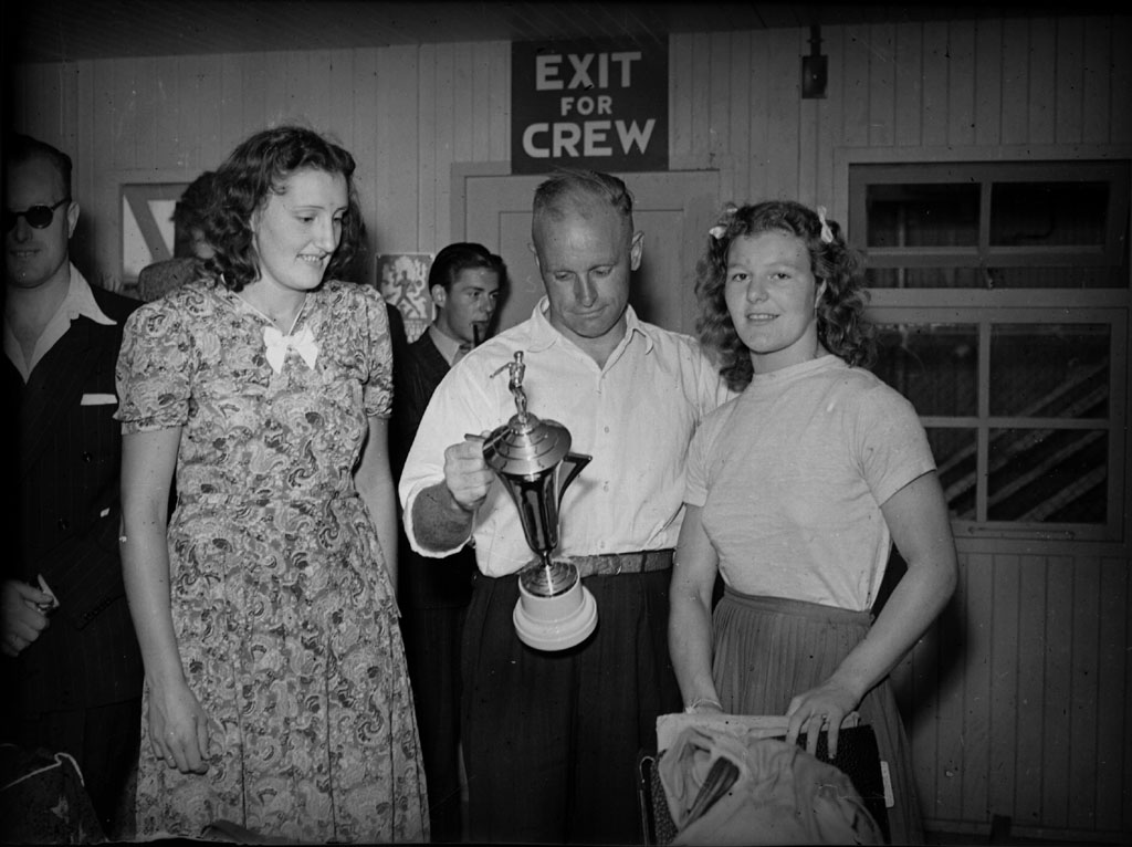 Aankomst op Schiphol van de zwemsters Iet Koster-van Feggelen en Nel van Vliet (rechts), 26 augustus 1947 Foto Ben van Meerendonk / AHF, collectie IISG, Amsterdam